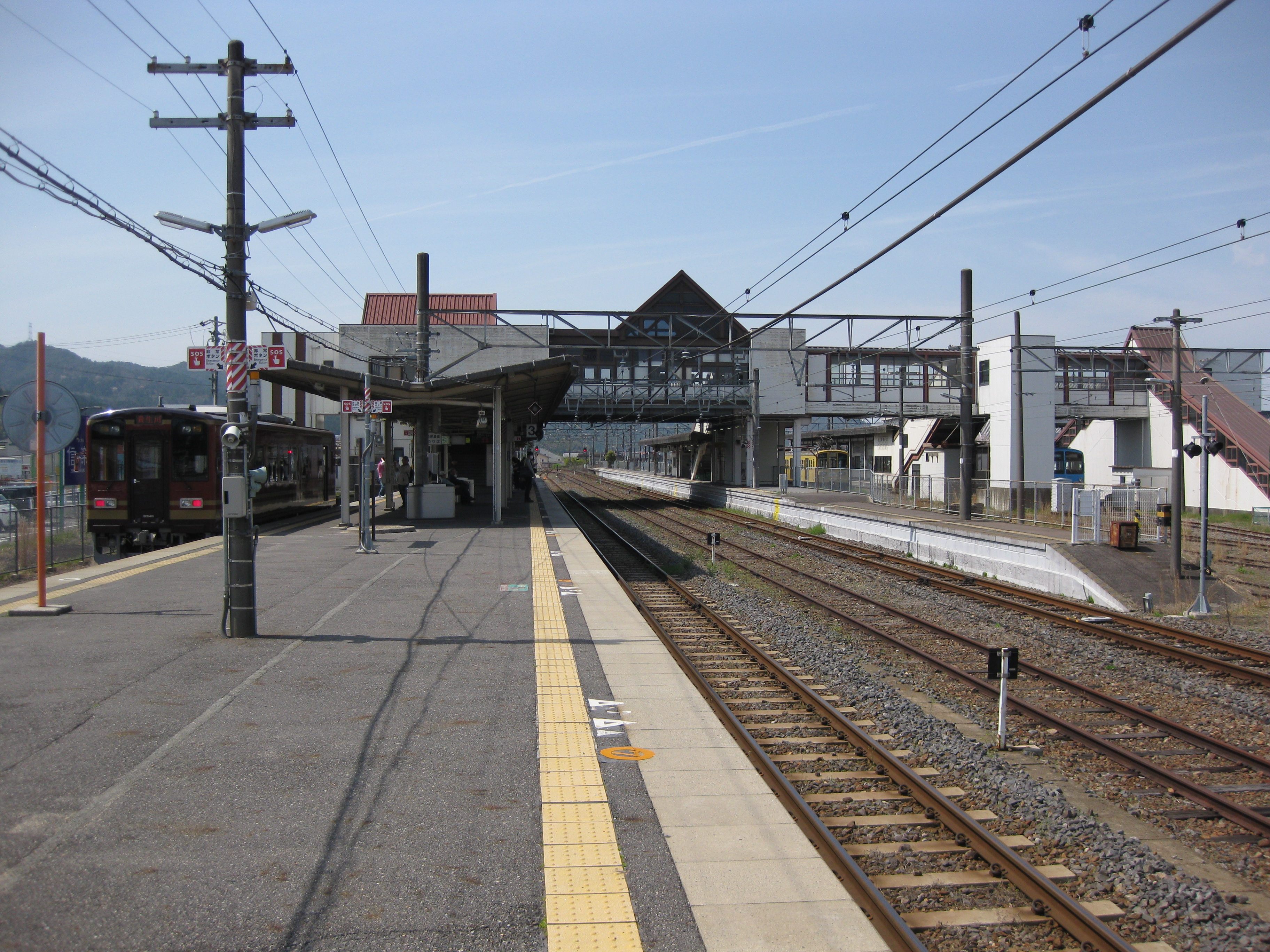 貴生川駅プラットホーム